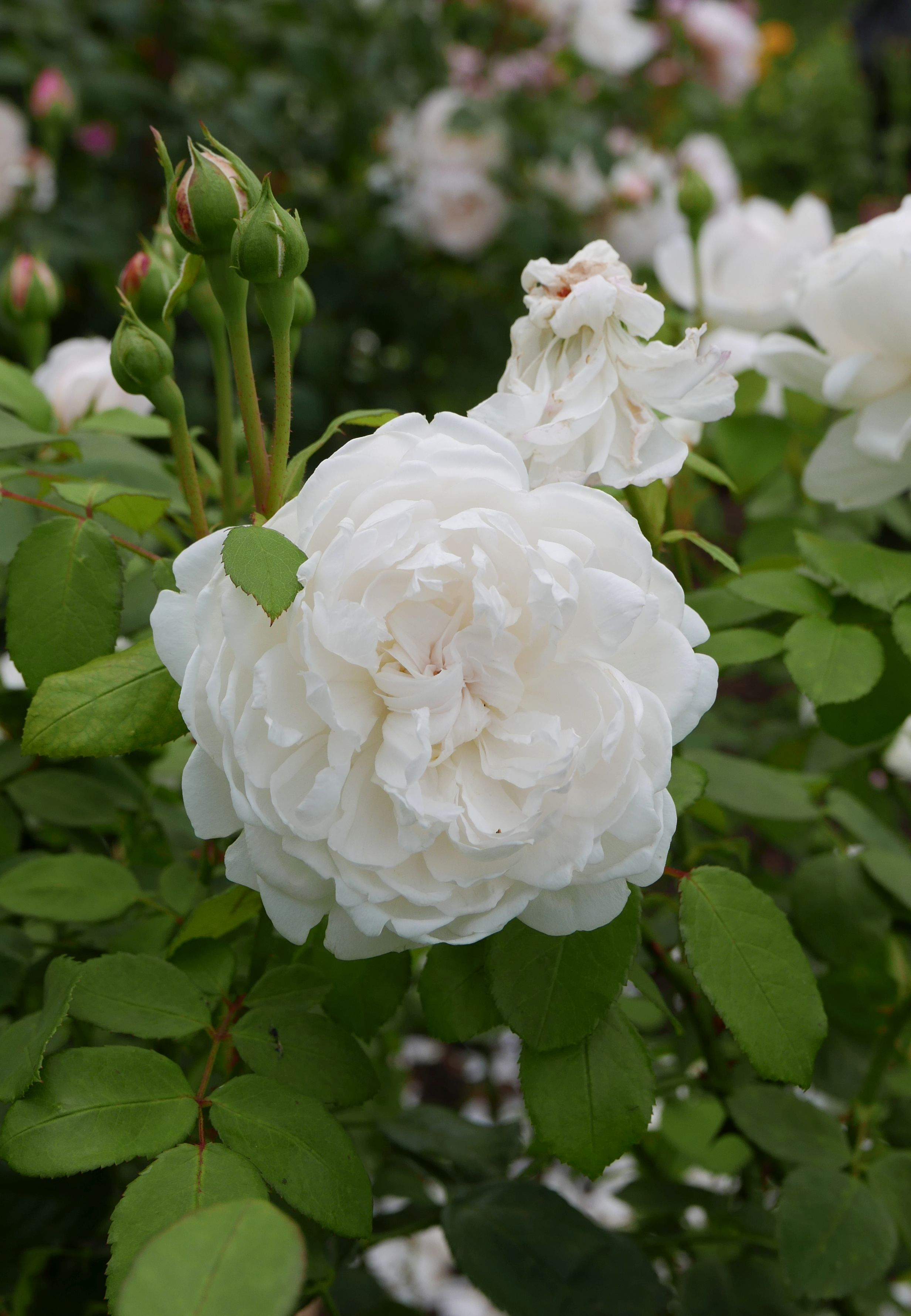 Rosa 'Glamis Castle' David Austin (1992) im Rosarium Sangerhausen, August 2017